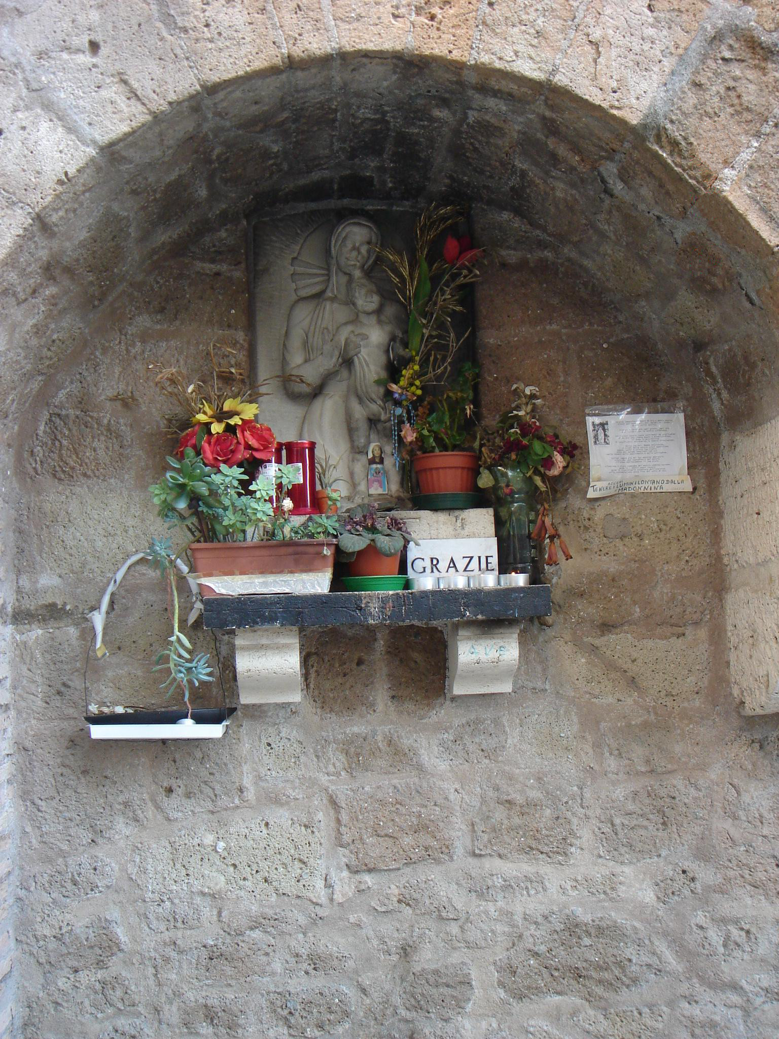 Roma , Ponte Nomentano: madonna in una nicchia